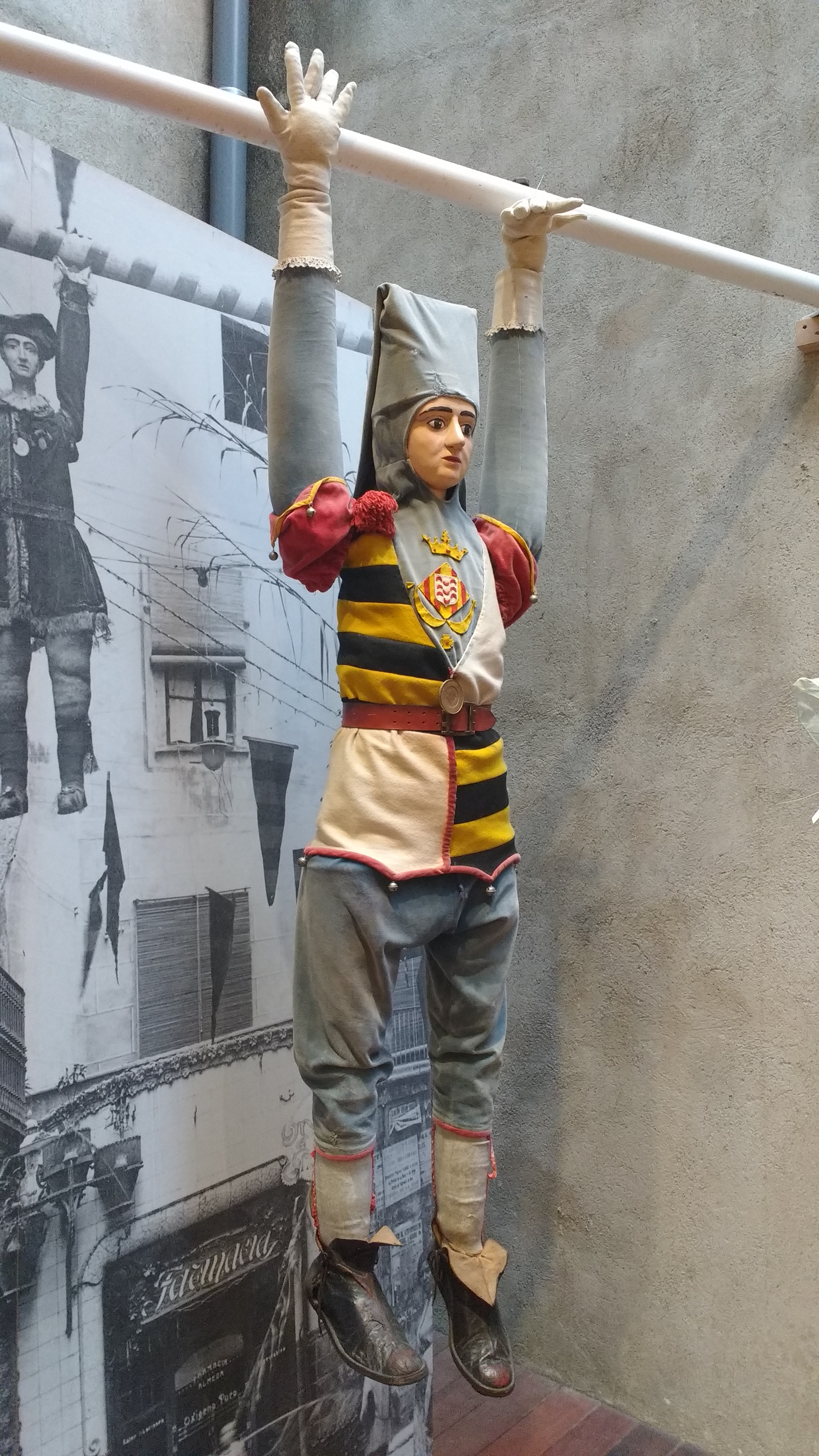 Antic Tarlà de l'Argenteria. Material: fusta Mides: 165x58x19 cm Datació: 1902 MHG